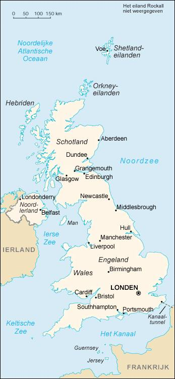 Dit is een kaart van het Verenigd Koninkrijk